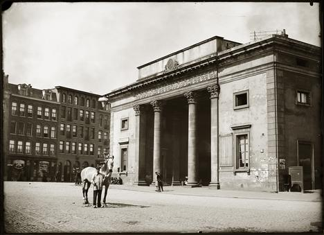 Haarlemmerplein Amsterdam